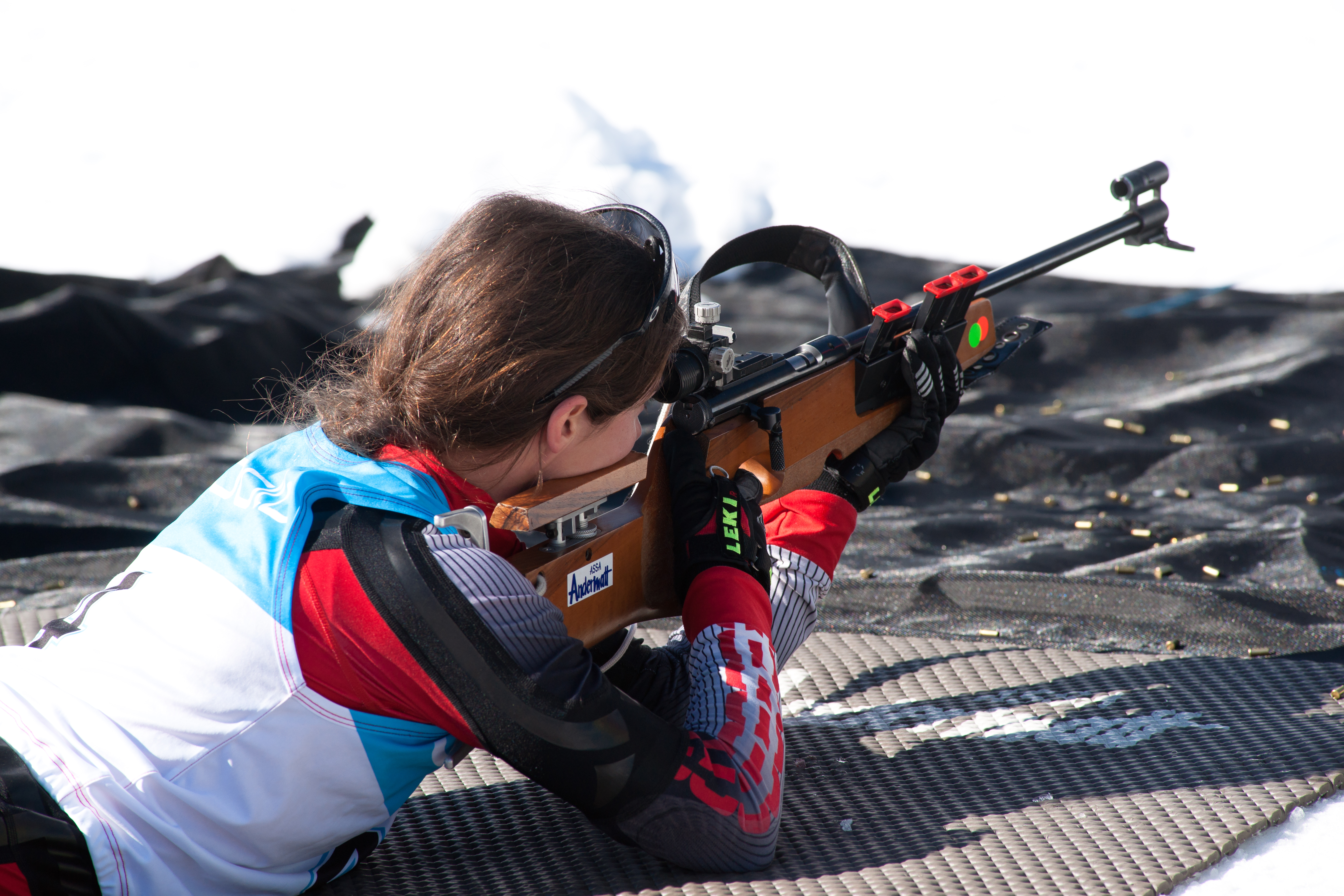 Biathlète femme (Patrizia Püntener) aux Mosses pour la Coupe suisse de Biathlon.